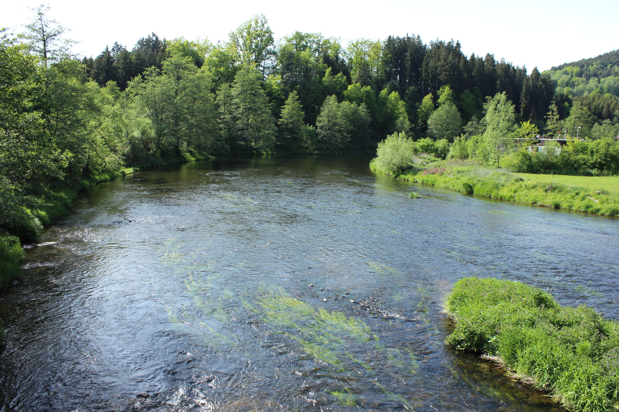 Blick auf den Schwarzen Regen in der Ortschaft Teisnach, Landkreis Regen. Naturpark Bayerischer Wald.